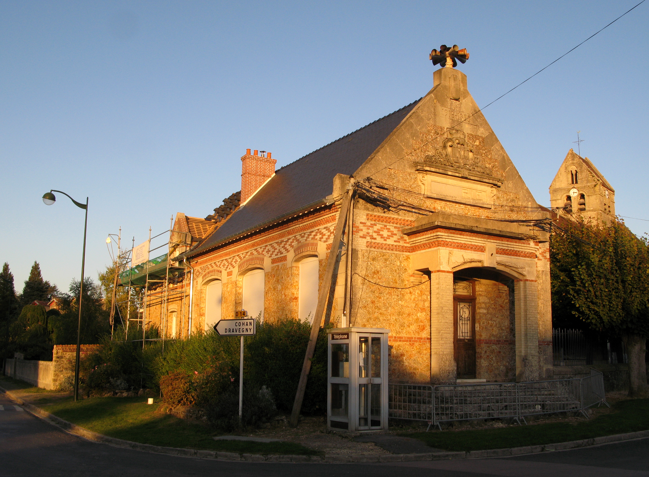 Coulonges-Cohan (Aisne, France) - L'école primaire (de Coulonges-Cohan) est en travaux de réfection de toiture. Le bâtiment est caractérisé par la sirène installée en haut du pignon. .